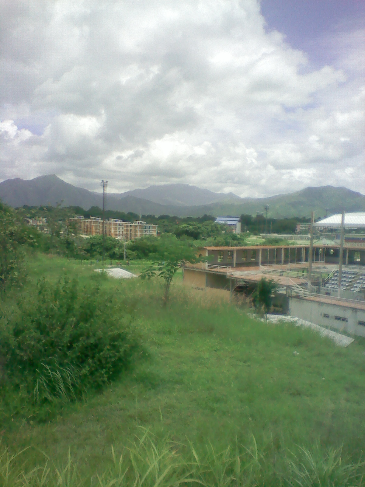 Vista del Cerro Platillon y las montañas vecinas que superan los 1.000 msnm